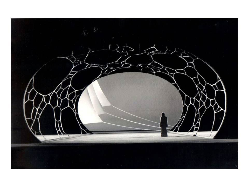 דידו ואינאס